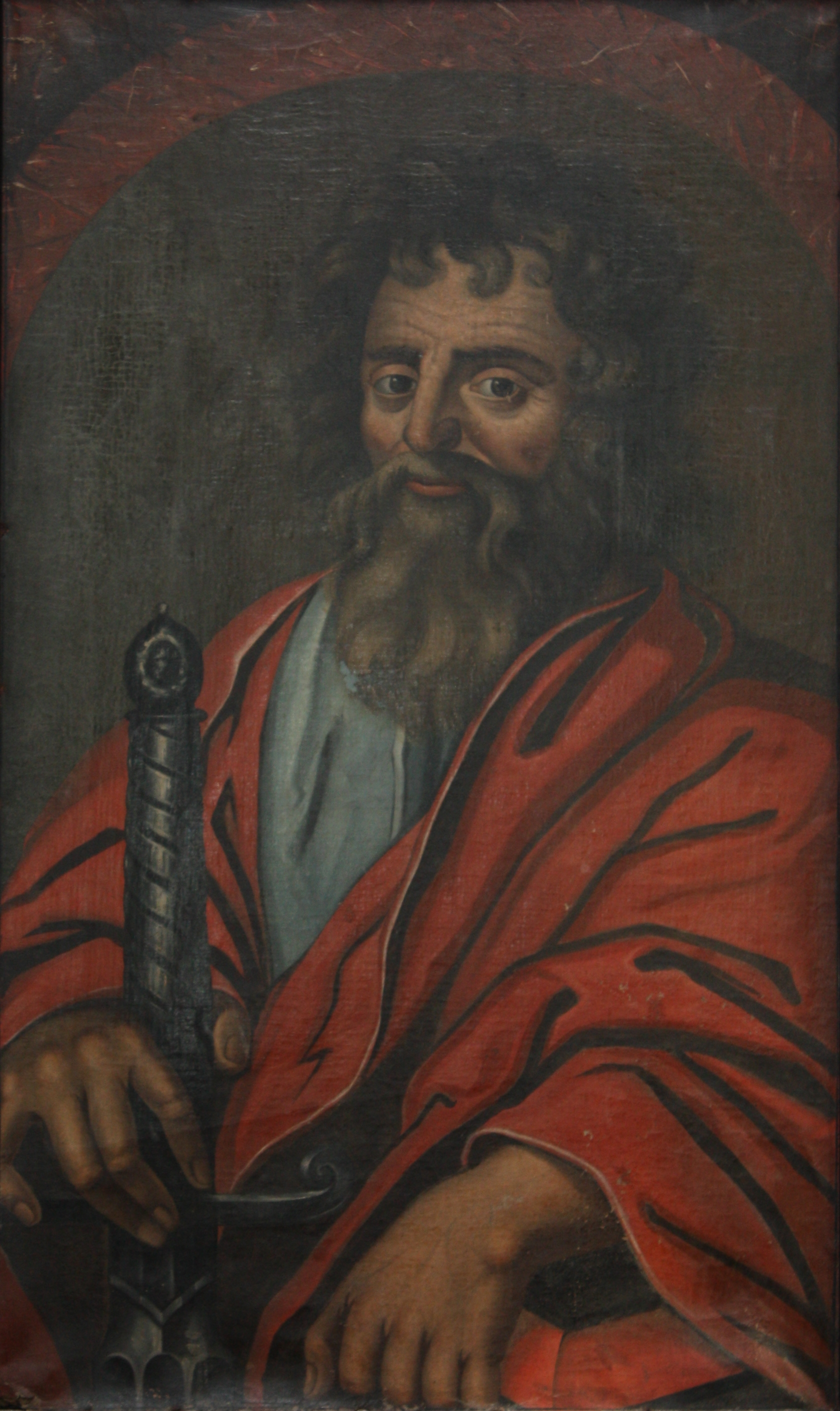 St. Paulus in St. Magnus in Esens